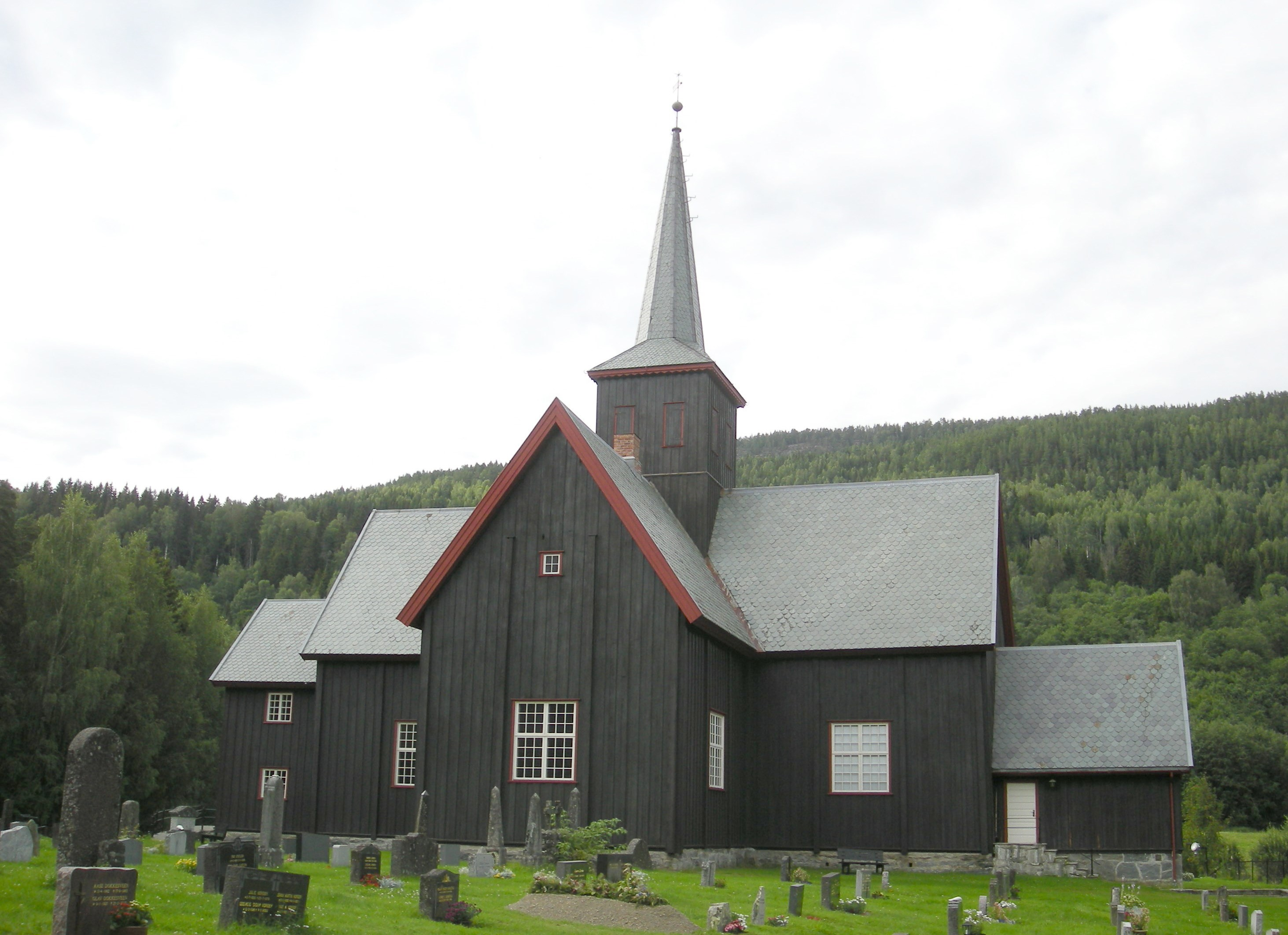 Nordsinni kirke